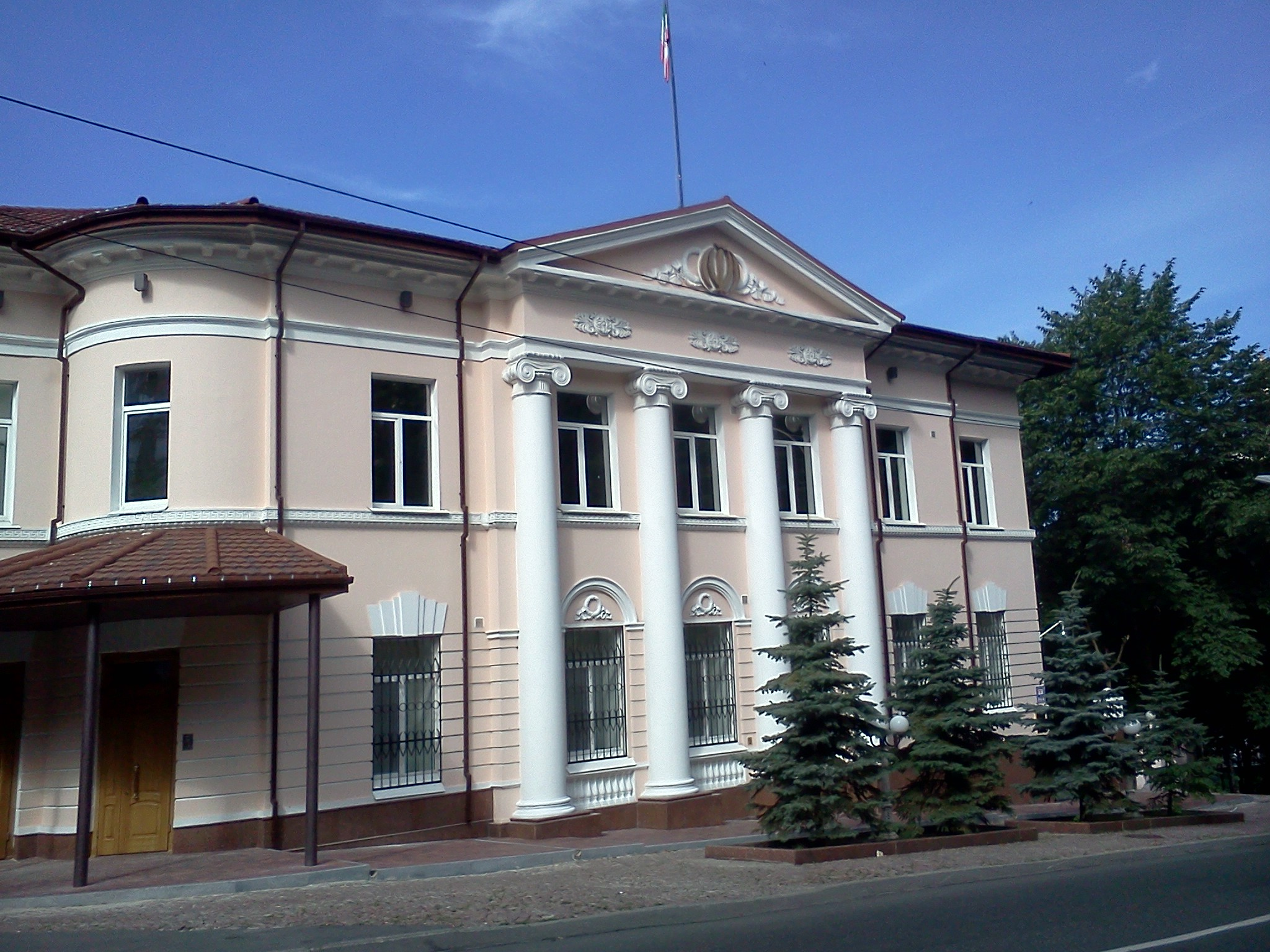 Посольство Ірану в Києві